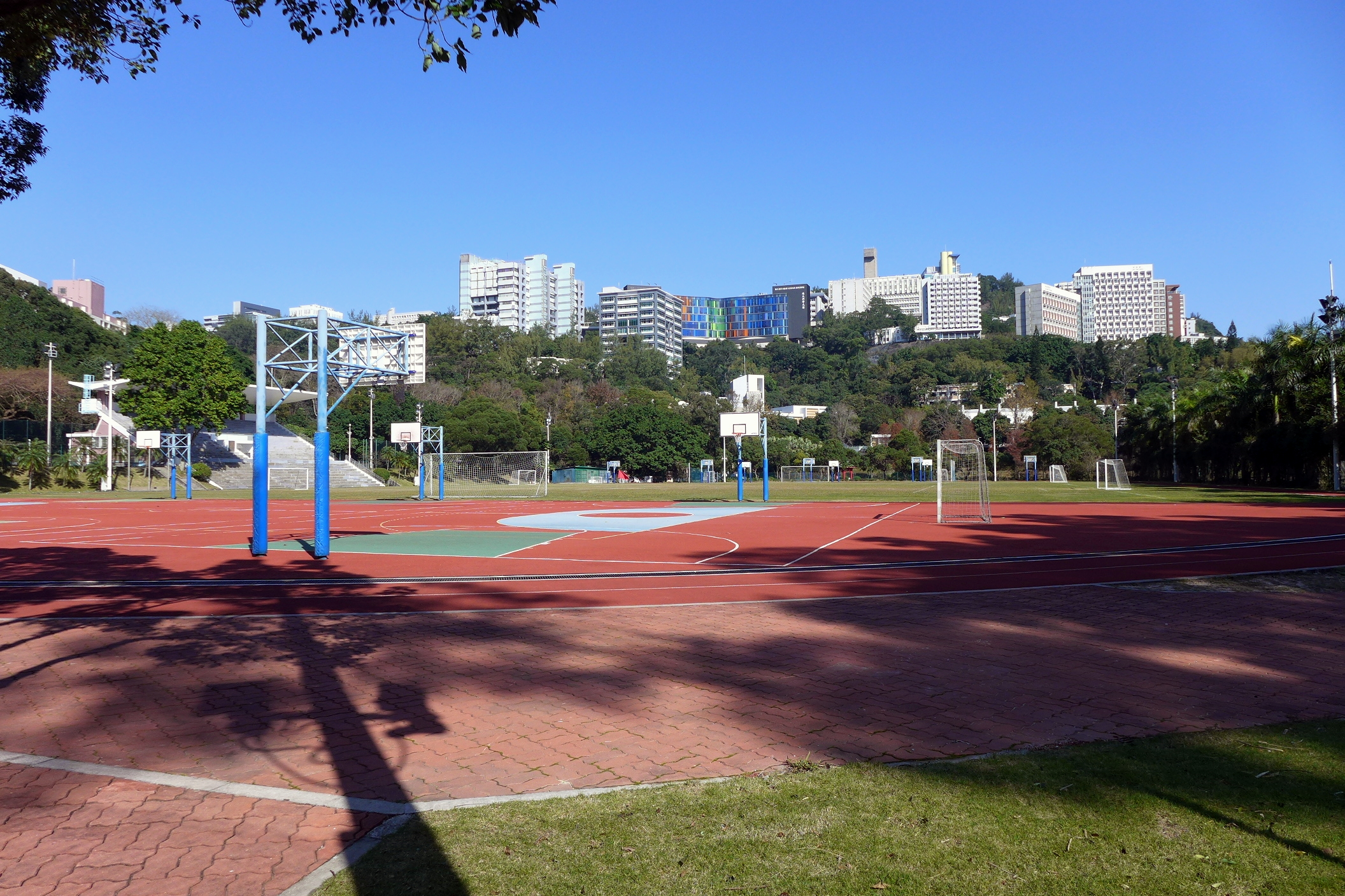 Lingnan Stadium